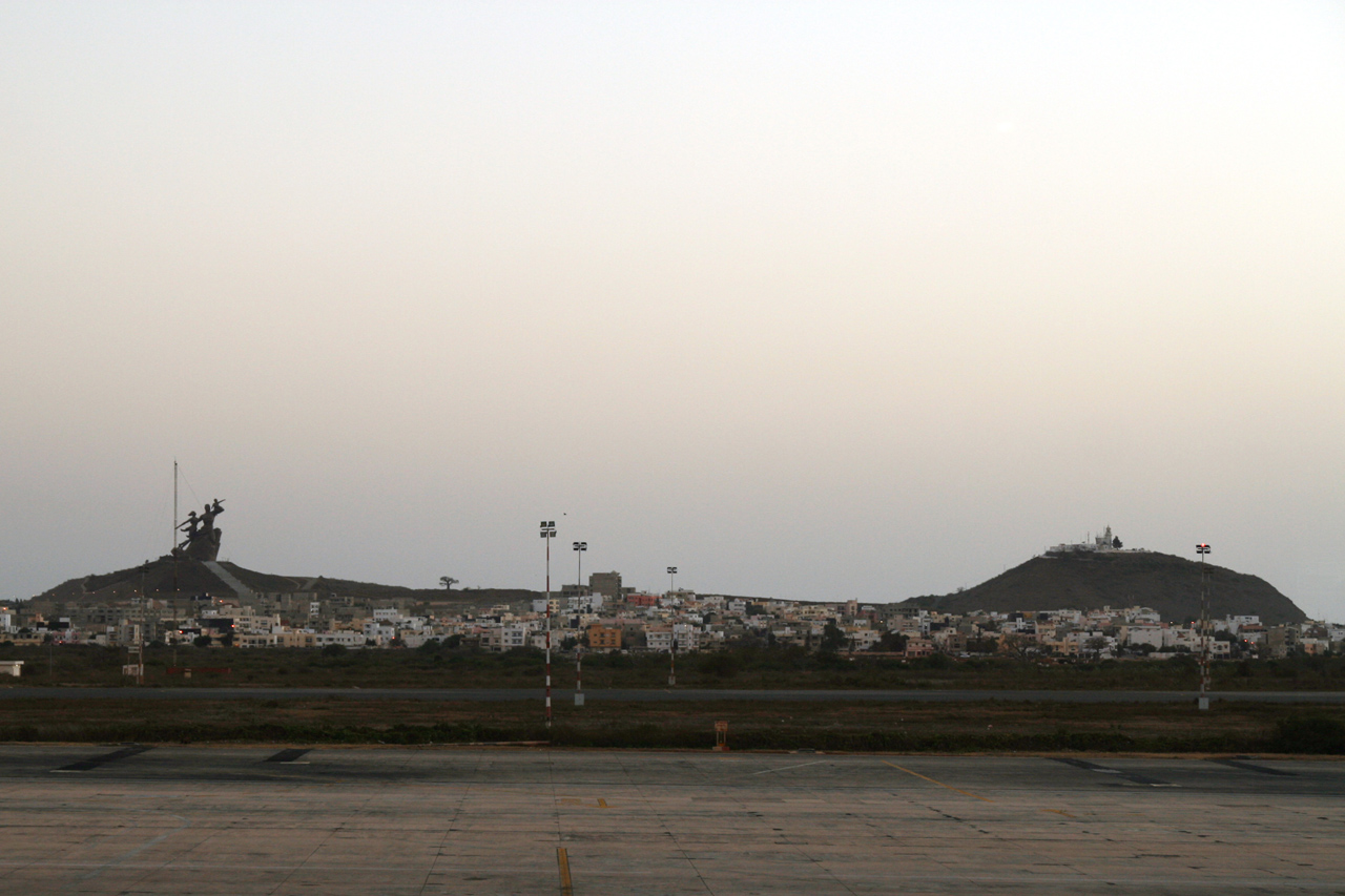 Collines des Mamelles à Dakar vues de l'aéroport.